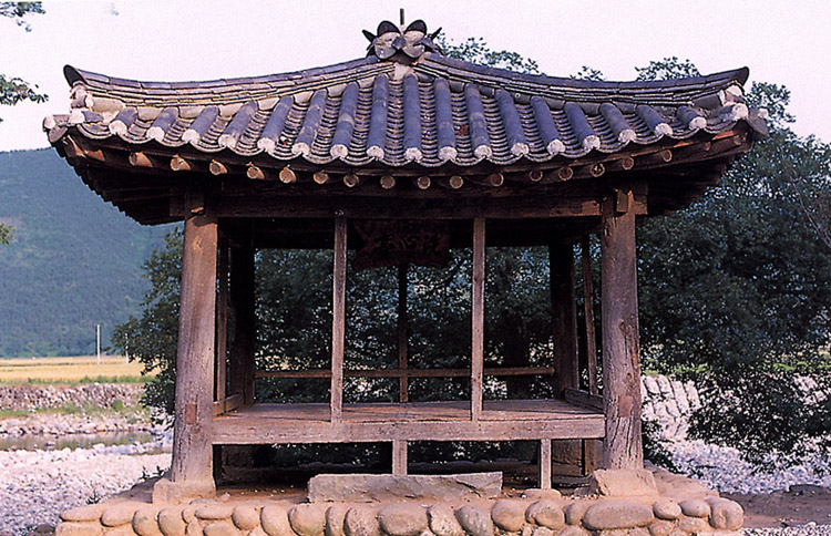 사적 제305호 산청 조식 유적 (山淸 曺植 遺蹟) - 세심정